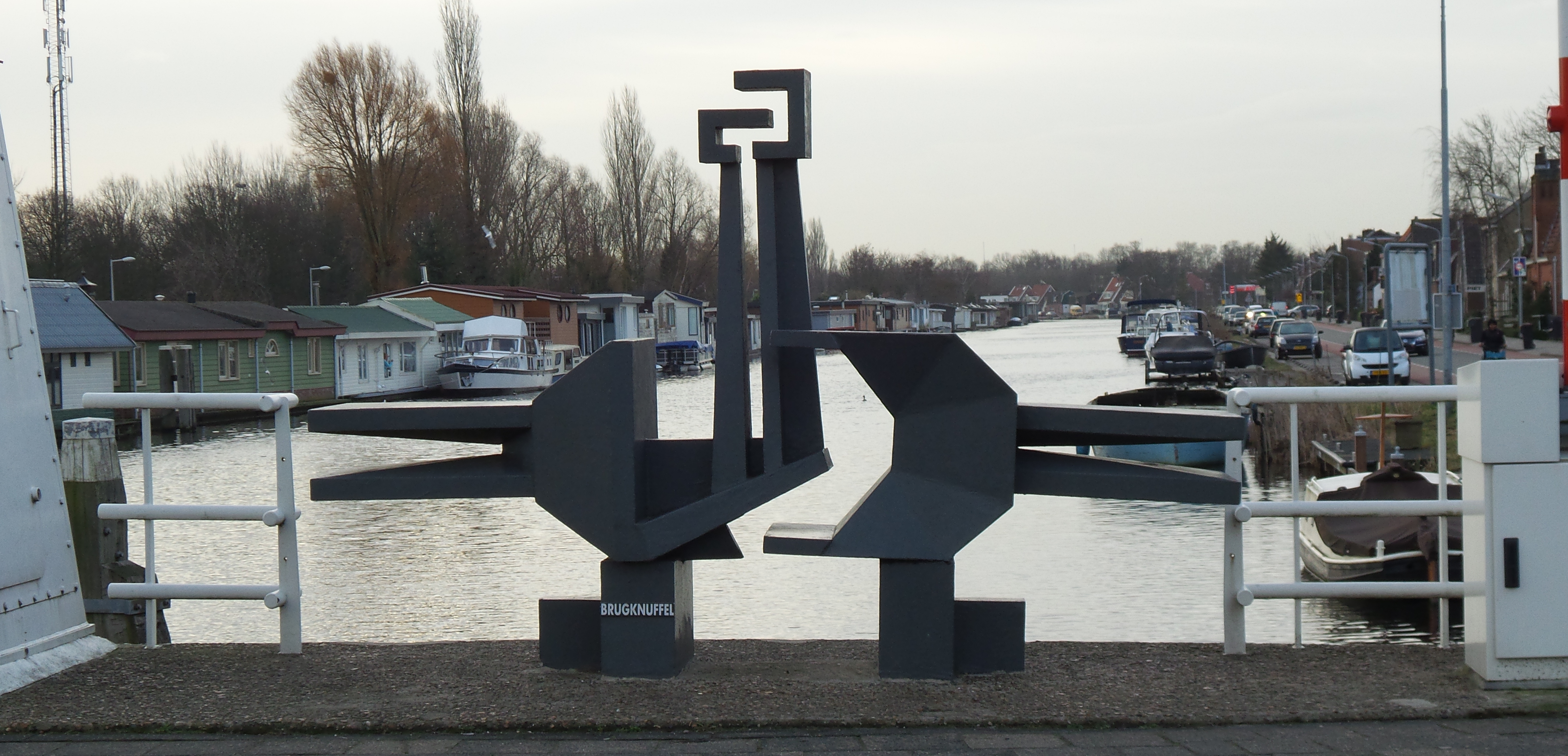 Brugknuffel; kunstwerk bij de brug over de ringvaart tussen Sloten Noord- Holland en Badhoevedorp